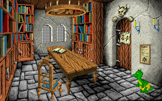 Dračí Historie - Česká adventura z roku 1994